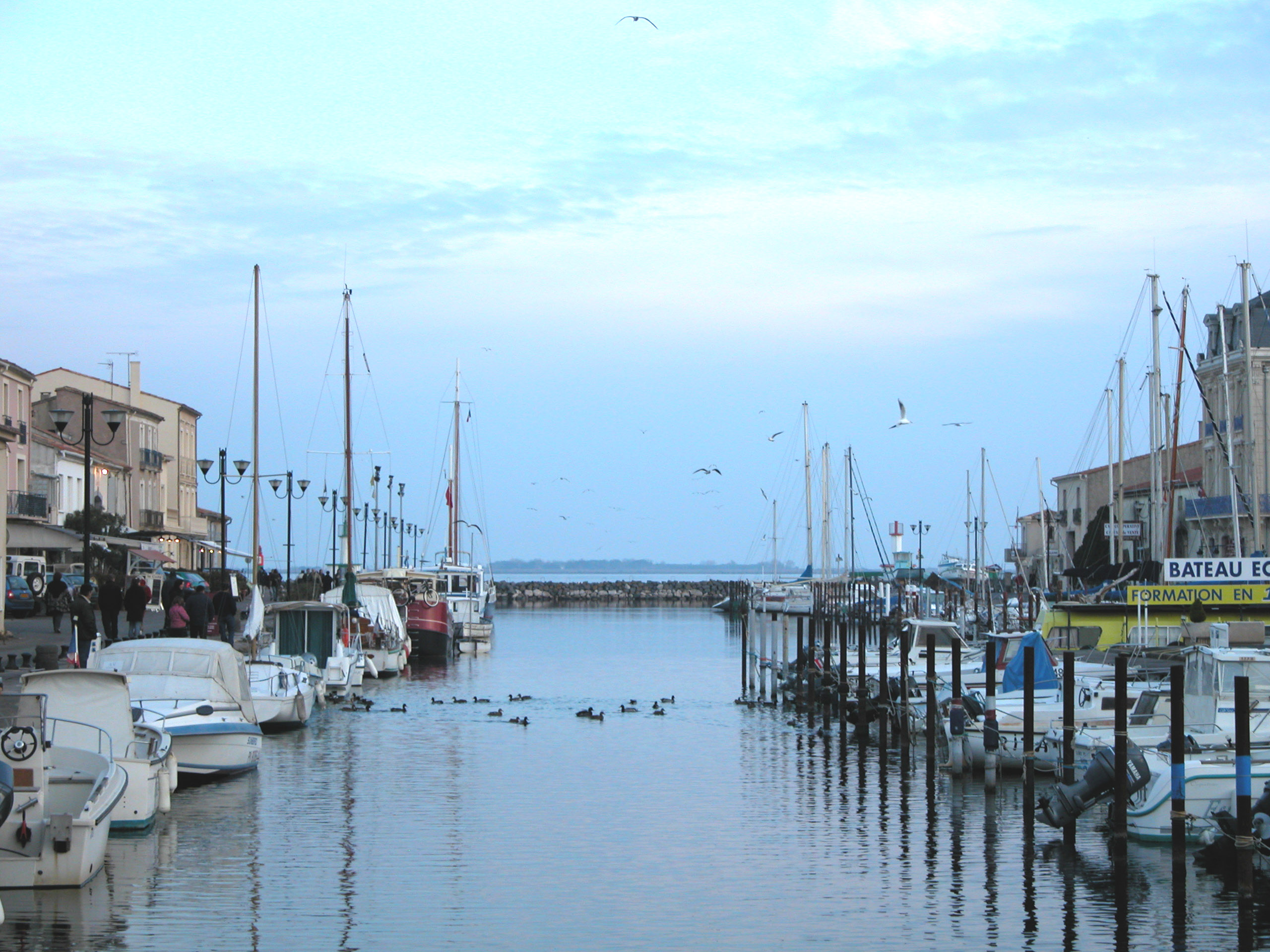 Vue du port de Marseillan (Hérault). Hiver 2005.